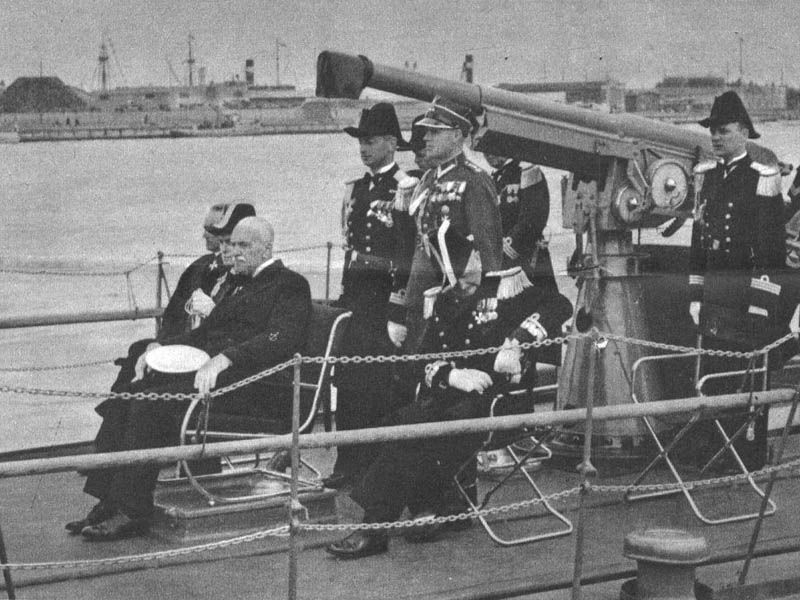 Ignacy Mościcki na pokładzie ORP "Mazur", zacumowanego w porcie na Oksywiu, obserwuje paradę okrętów i lotnictwa morskiego z okazji "Dni Morza".